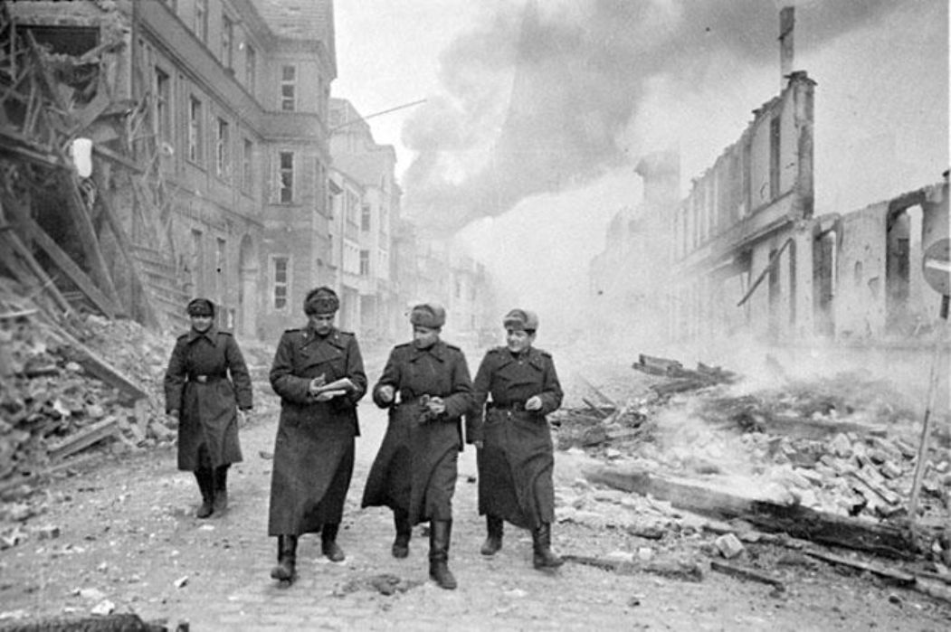 Starogród marzec 1945. W tym mieście znajduje się kompleks wojskowy Biale koszary. Na zdjęciu żołnierze radzieccy na Breitestrasse (obecnie ul. Złotników). Po lewej stronie dawny budynek gazety Neues Pommersches Tage-Blatt. W kłębach dymu widoczny zarys wieży kościoła św. Jana.